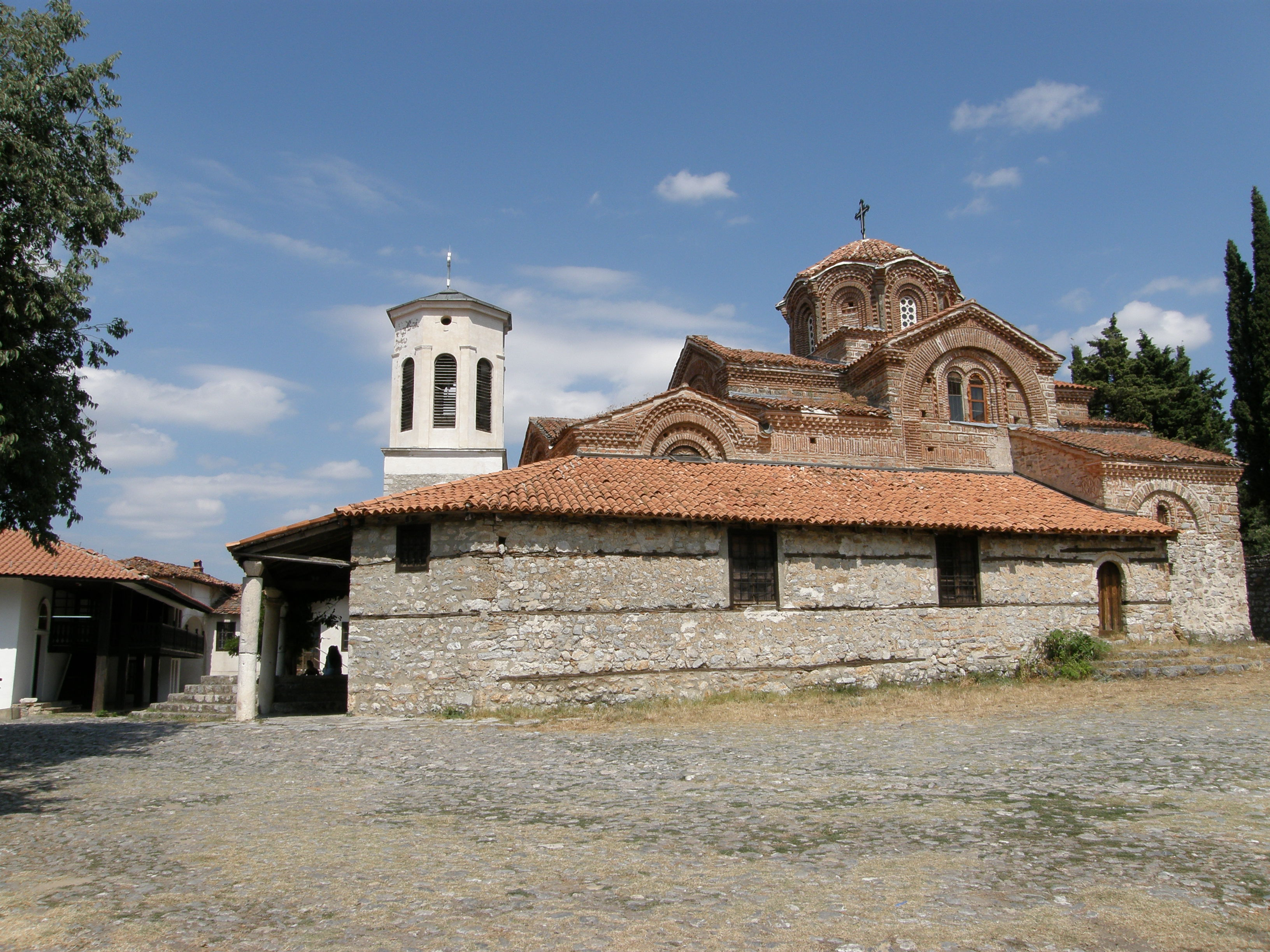 Света Богородица Перивлепта